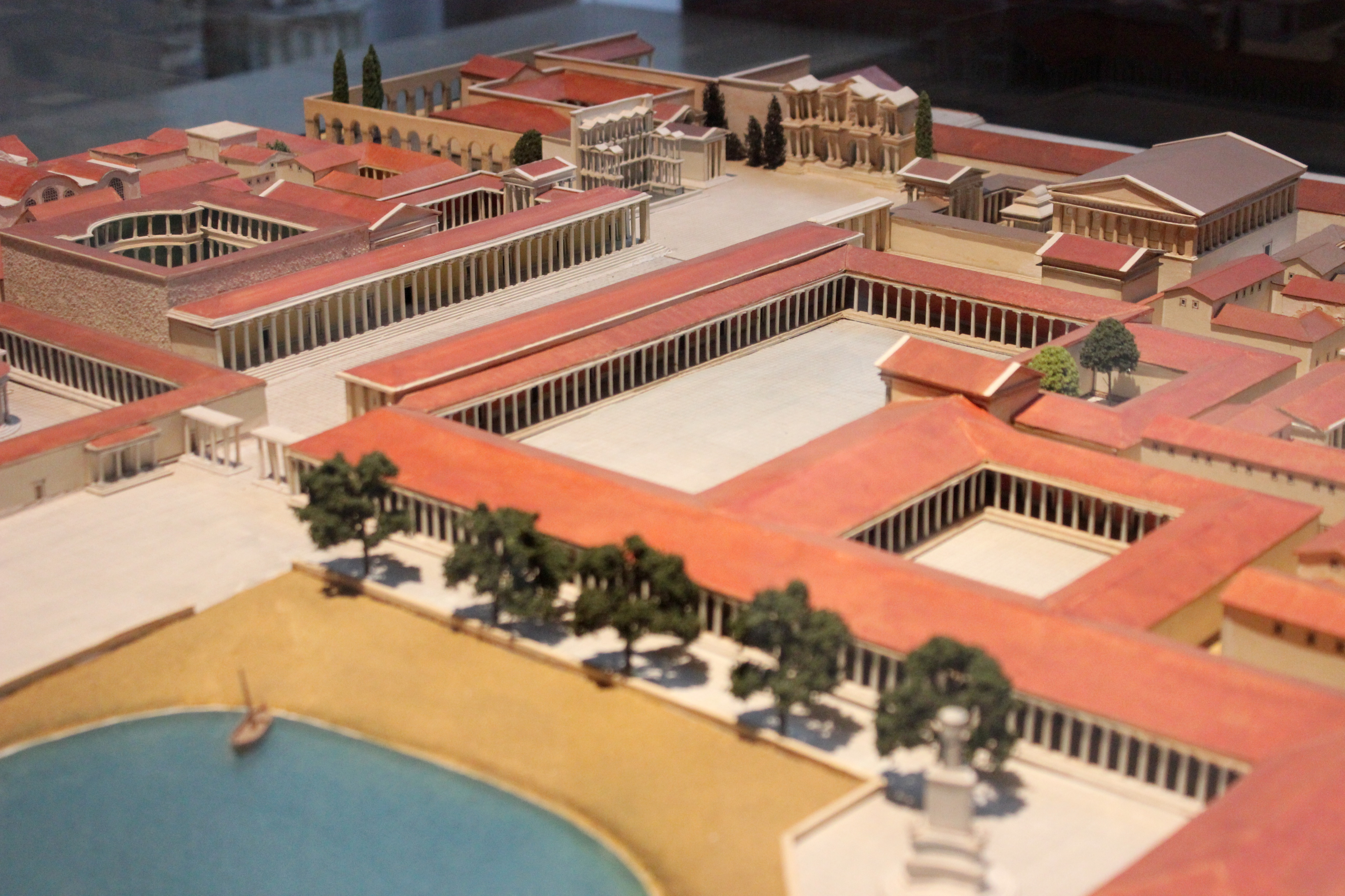 Berlín. Pergamon Museum. Maqueta de Mileto.